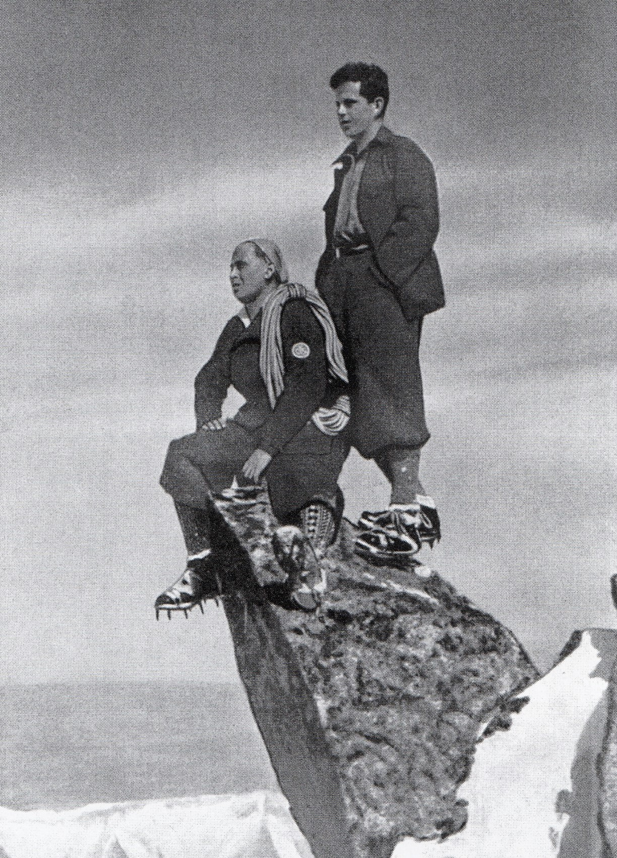 Horolezci horolezeckého spolku JAMES po výstupe na Baranie rohy vo Vysokých Tatrách v roku 1940- Slovakia